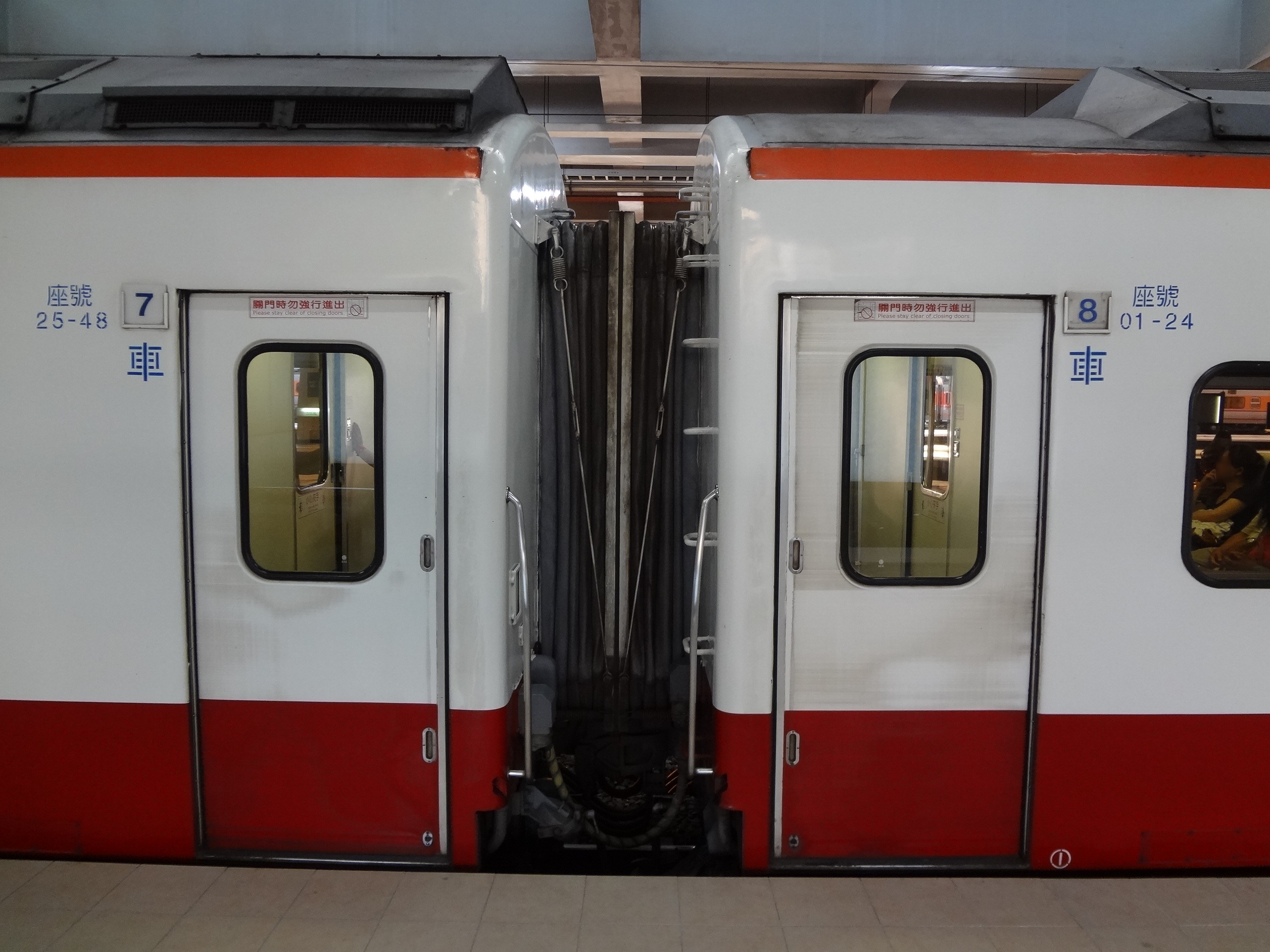 臺灣鐵路管理局EMU1200型電聯車的車間走道外觀